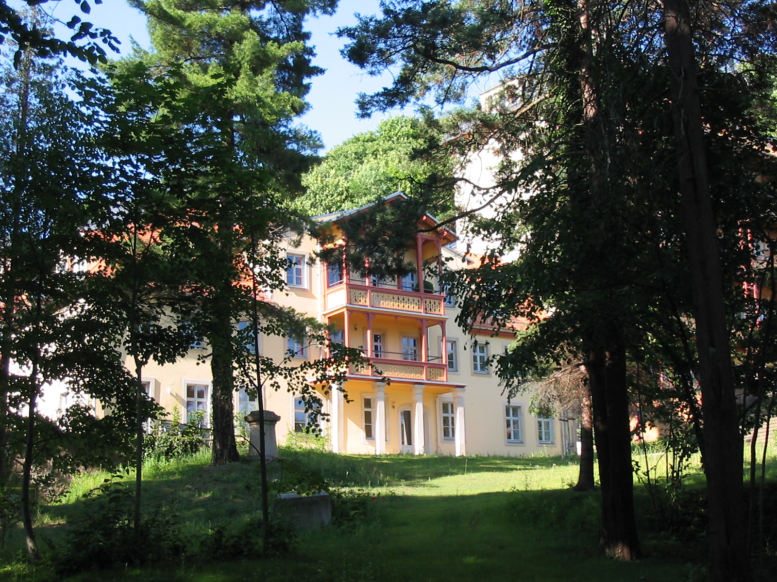 Radebeul Bilz-Sanatorium